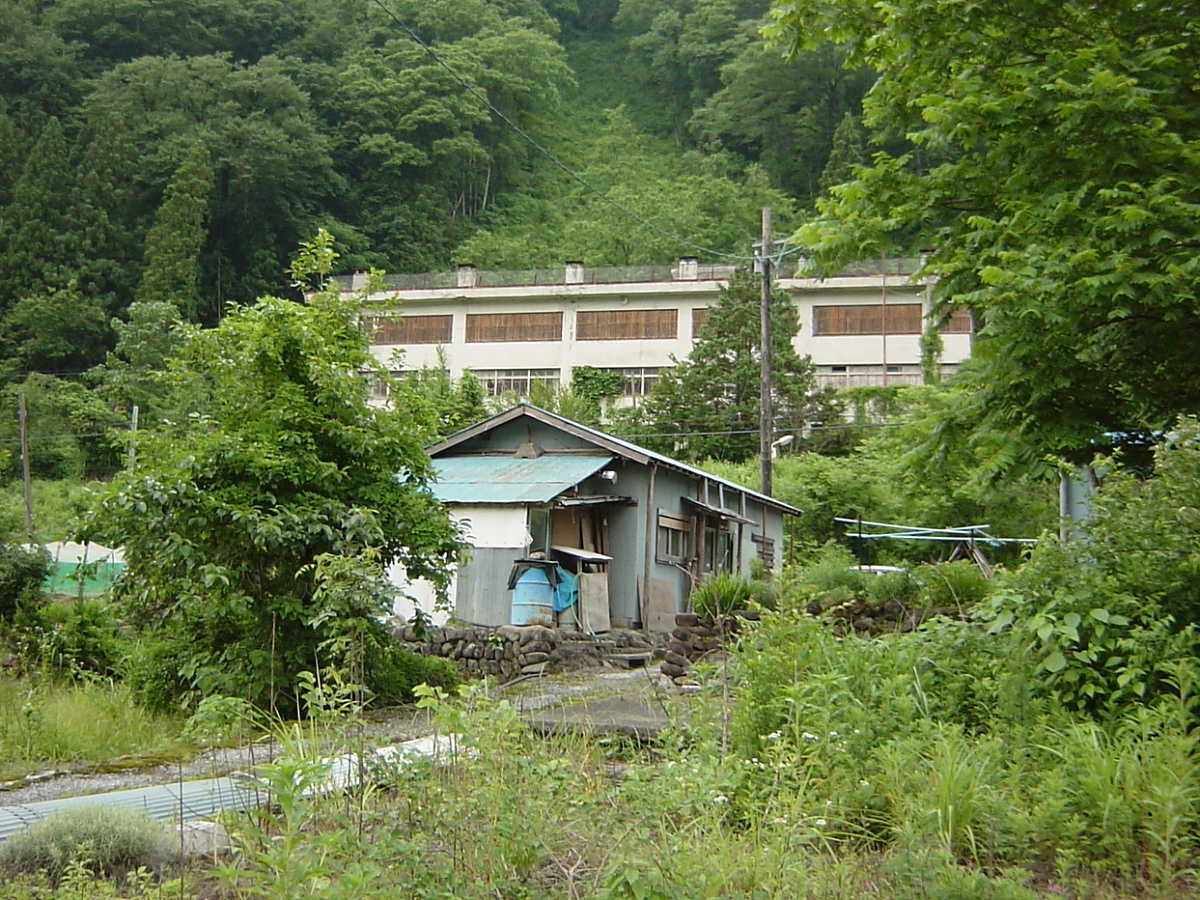 撮影日時 2003/06/21 17:45:06 撮影者 takecolo こちらのお宅には旧村民が実際に住んでおられました。背後は徳山小学校。